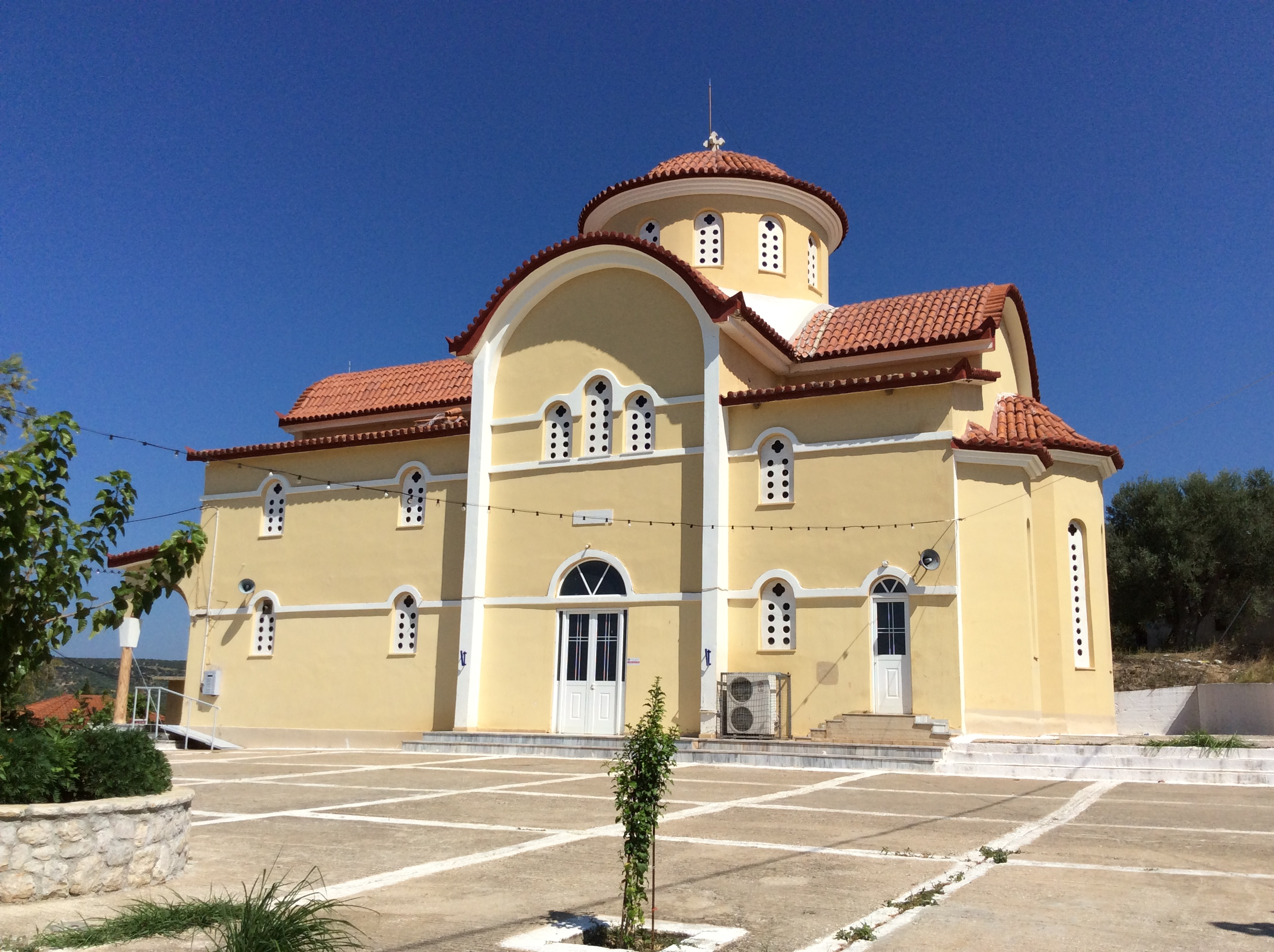 Κορυφάσιο Μεσσηνίας. Ο Ιερός Ναός του Αγίου Χαραλάμπους.